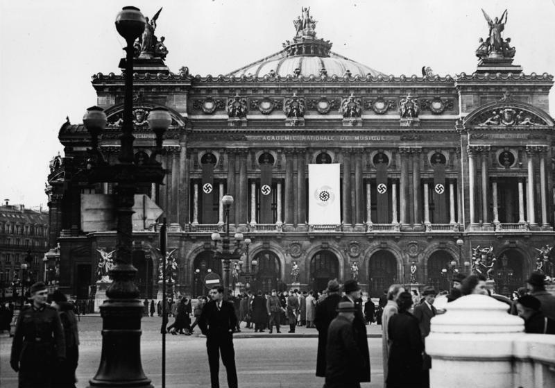 Pour le Rapprochement Franco-Allemand. Un grand Gala artistique a eu lieu dernierement a I'Opéra de Paris. Voici la décoration extérieure de la célèbre académie de musique.